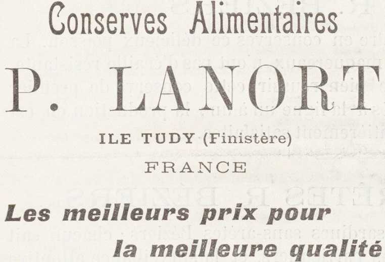 Publicité pour une conserverie de sardines de l'Île-Tudy publiée en décembre 1905 dans la revue mensuelle La Sardine